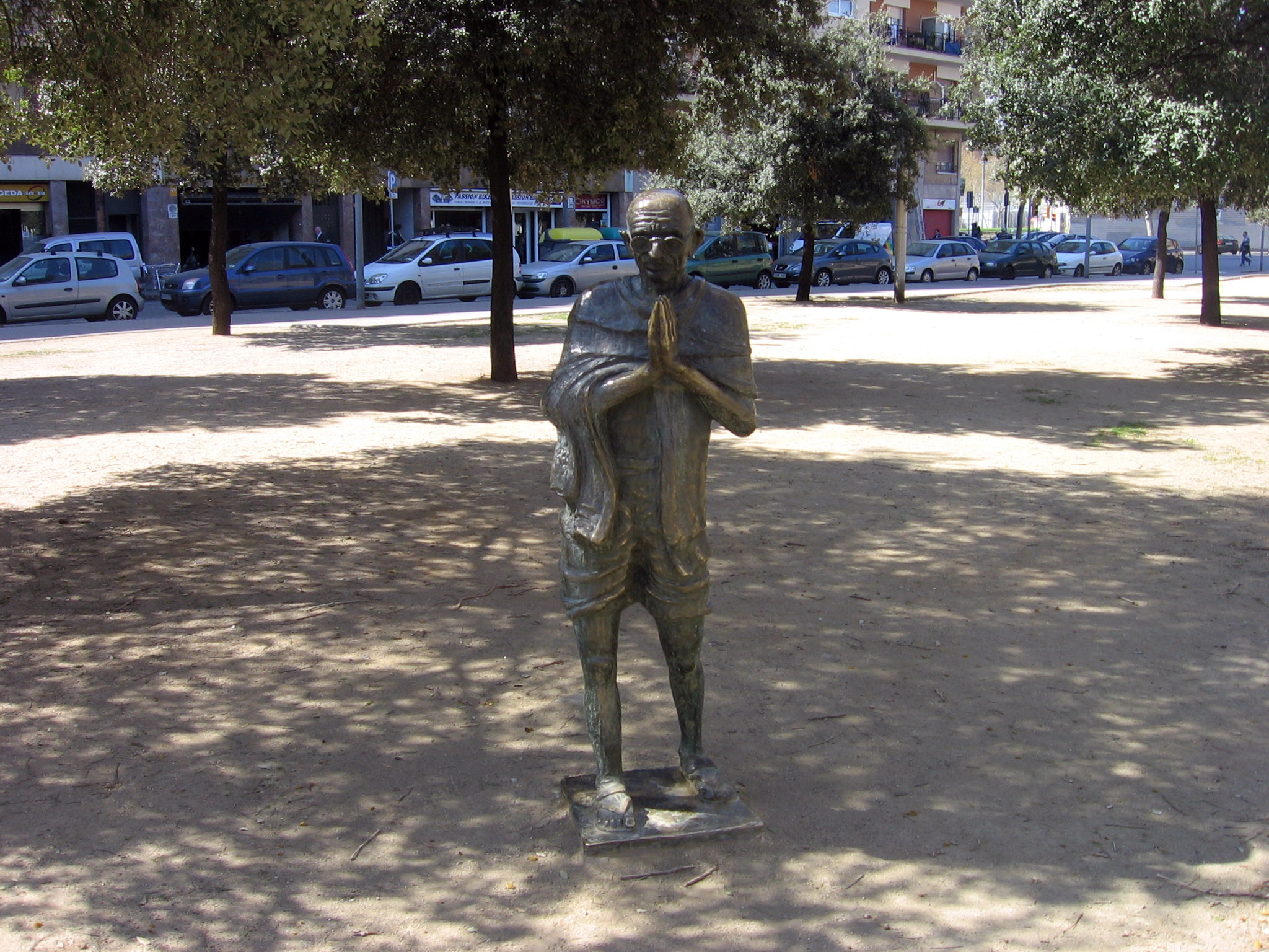 A Gandhi (2000, original de 1967), de Adolfo Pérez Esquivel, Jardines de Gandhi.